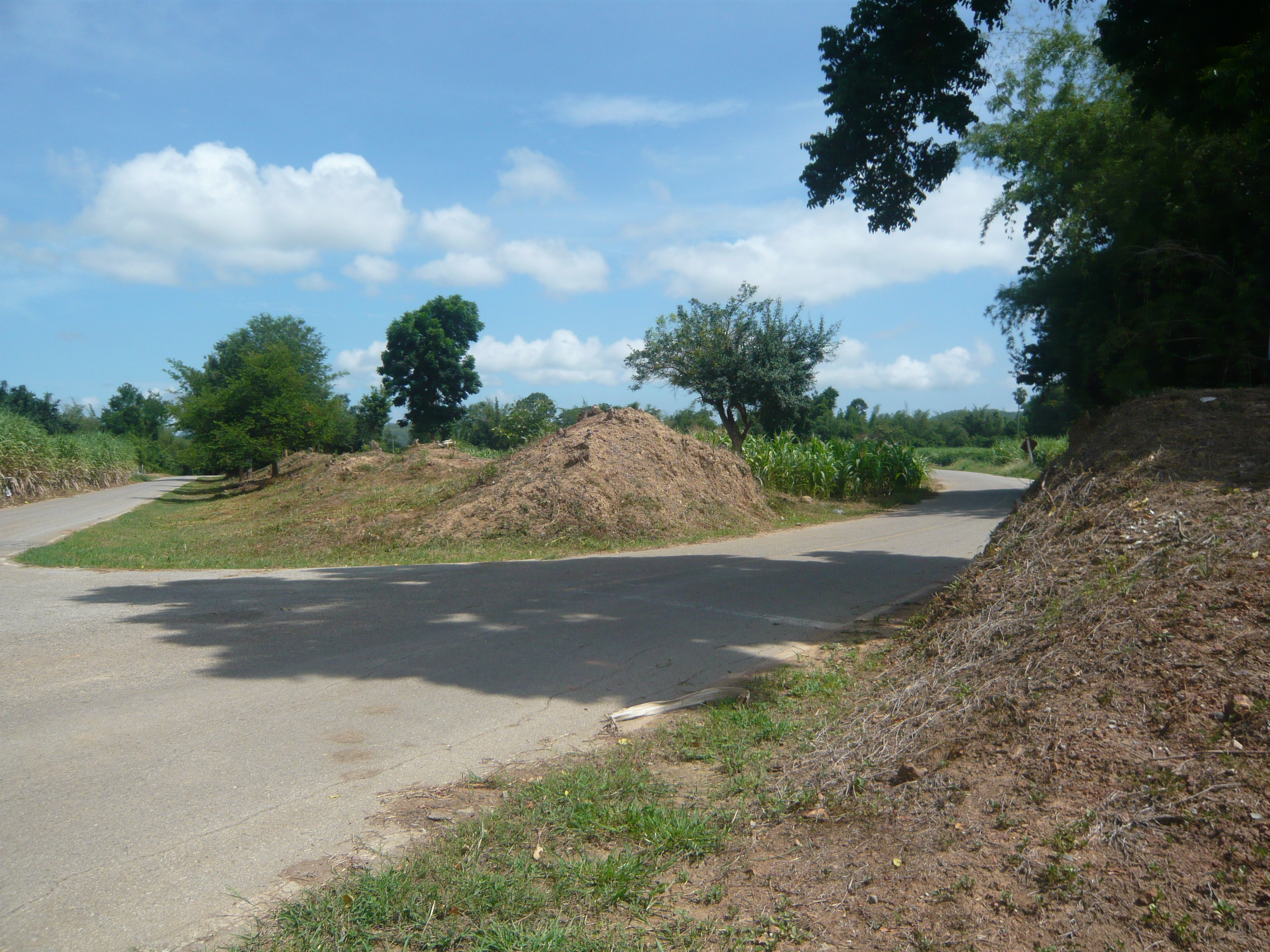 เมืองกลอนโด